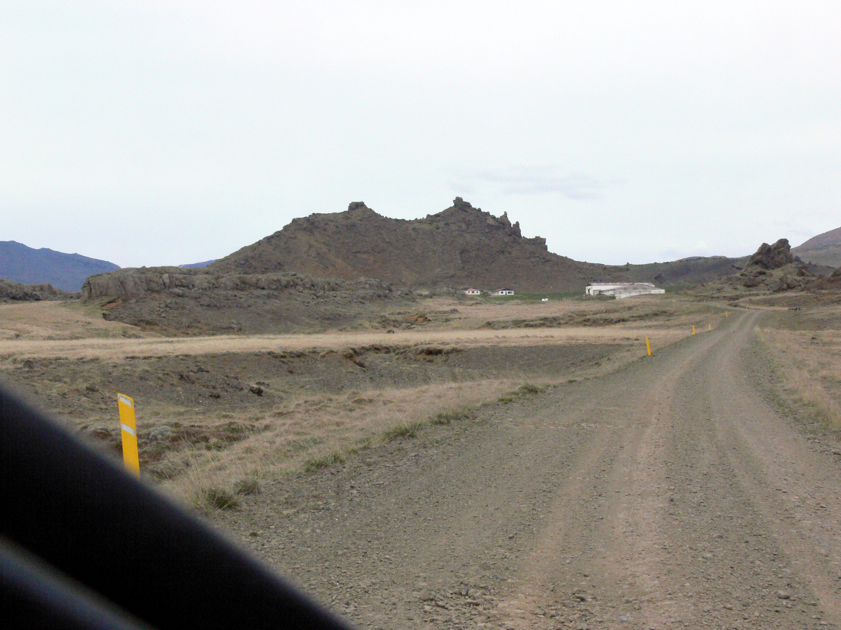 Hítardalur auf Snæfellsnes. Hítardalur nach der Landnámabók von Þórhaddur Steinsson erstmalig besiedelt. Am 30. Sebtember 1148 verbrannte Magnús Einarsson, Bischof von Skálholt dort mit 72 Menschen bei einem Großfeuer. 1166 oder 1168 wurde hier ein Benediktinerkloster gegründet, das aber schon 1201 wieder geschlossen wurde. Sitz vieler mittelalterlicher Gelehrter.